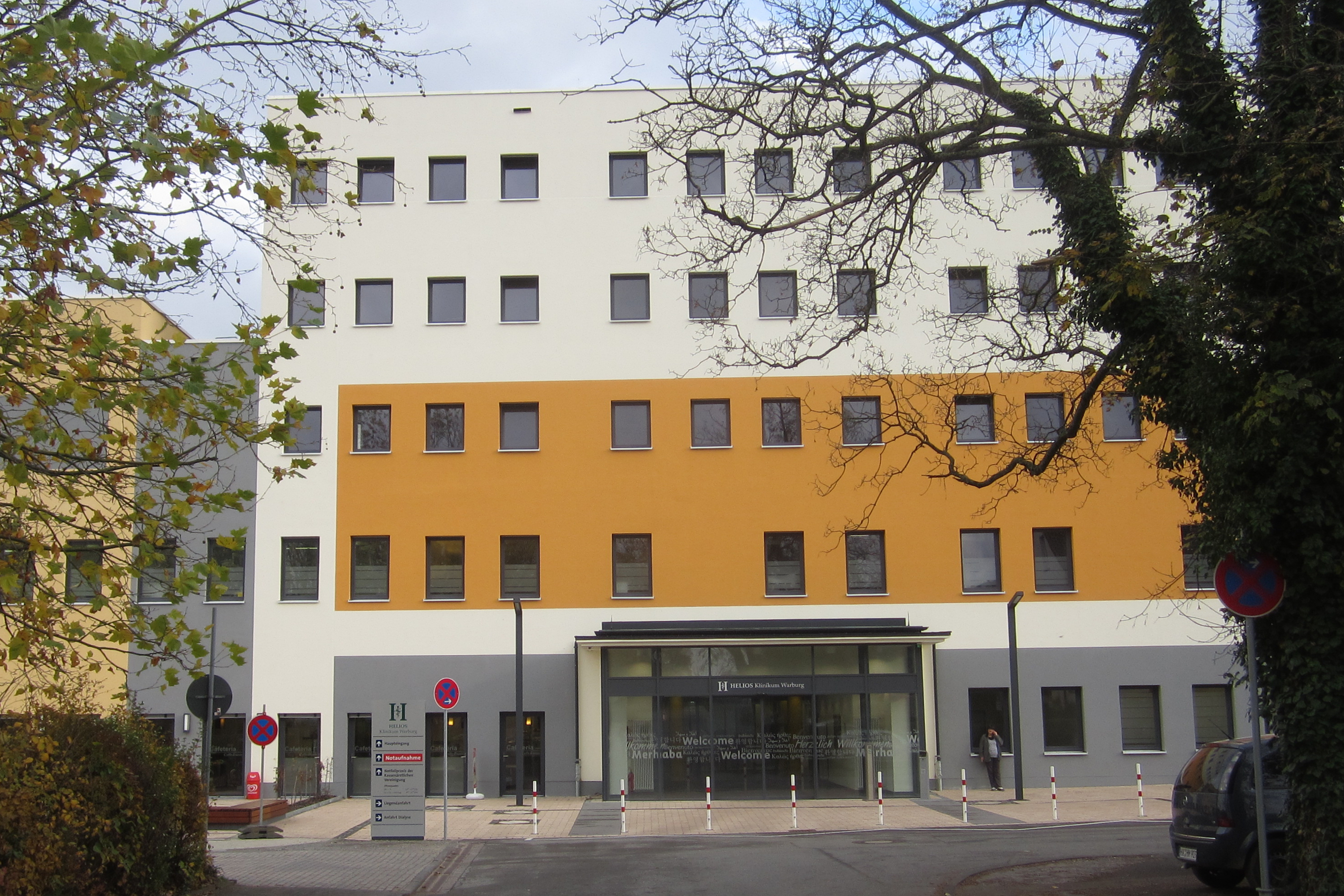 Der Eingang des neuen Helios Klinikum Warburg (ehemals St.-Petri-Hospital Warburg) im November 2014.